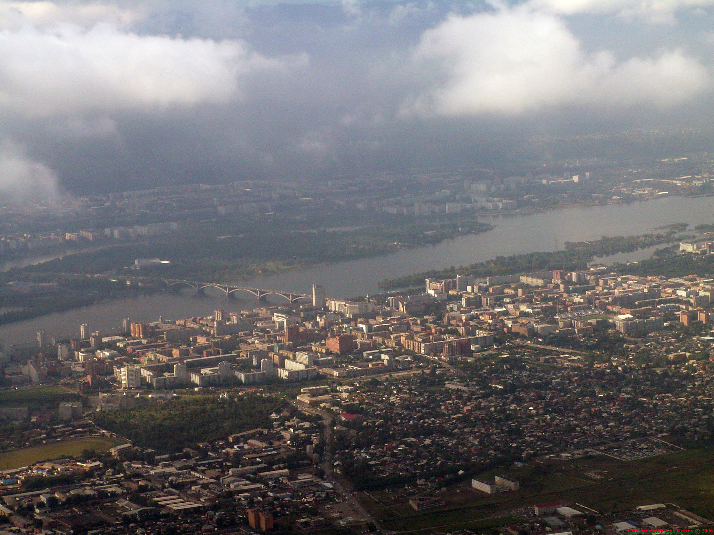 Красноярск, Коммунальный мост через р.Енисей